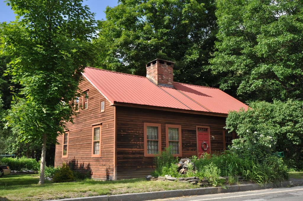 632 Main Street, West Chesterfield, Massachusetts